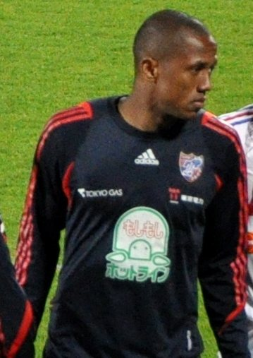 Cabore, Kashiwa 0 - 3 Tokyo (Goals: Ishikawa, Cabore, Hirayama)